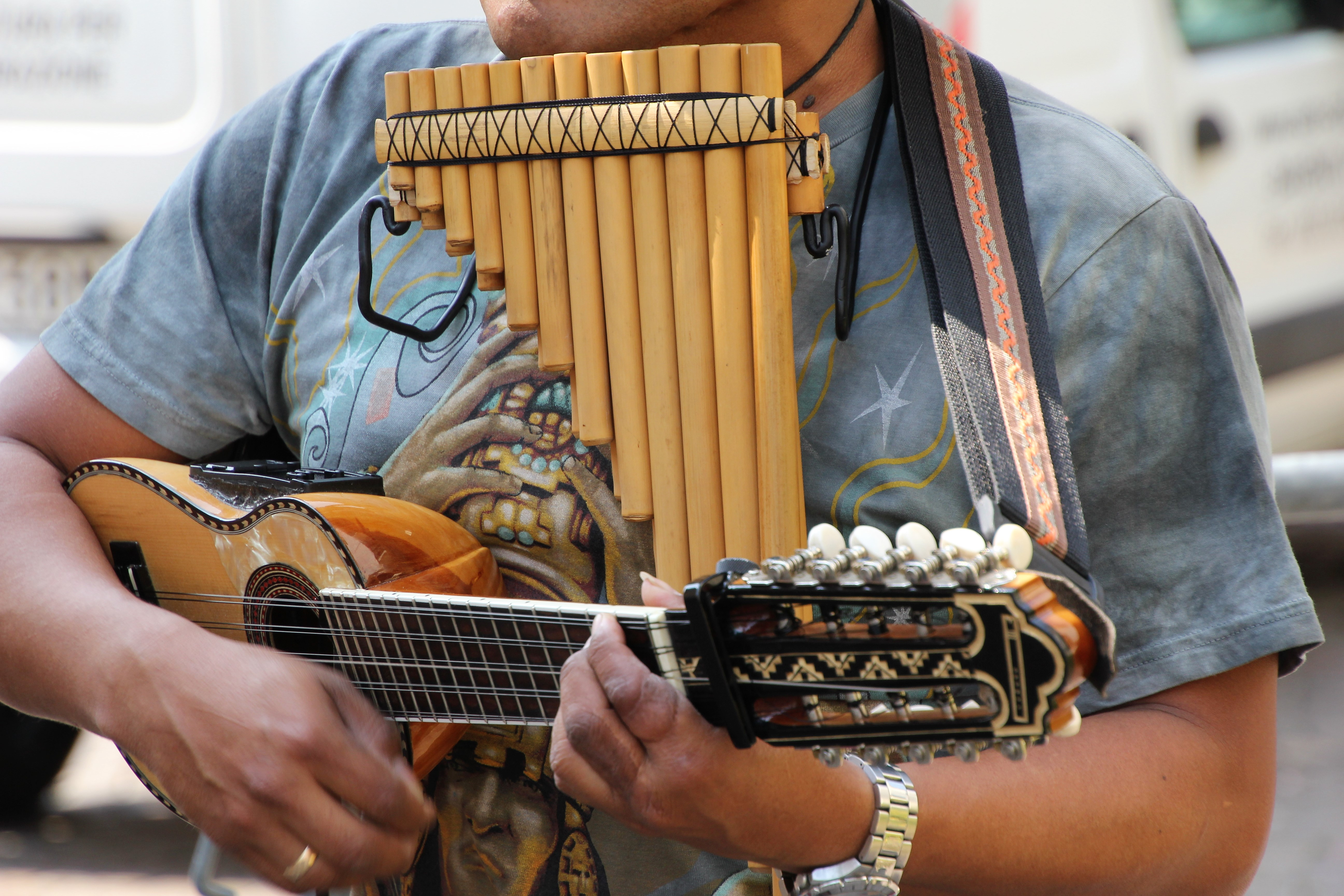 Strumento tipico sudamericano